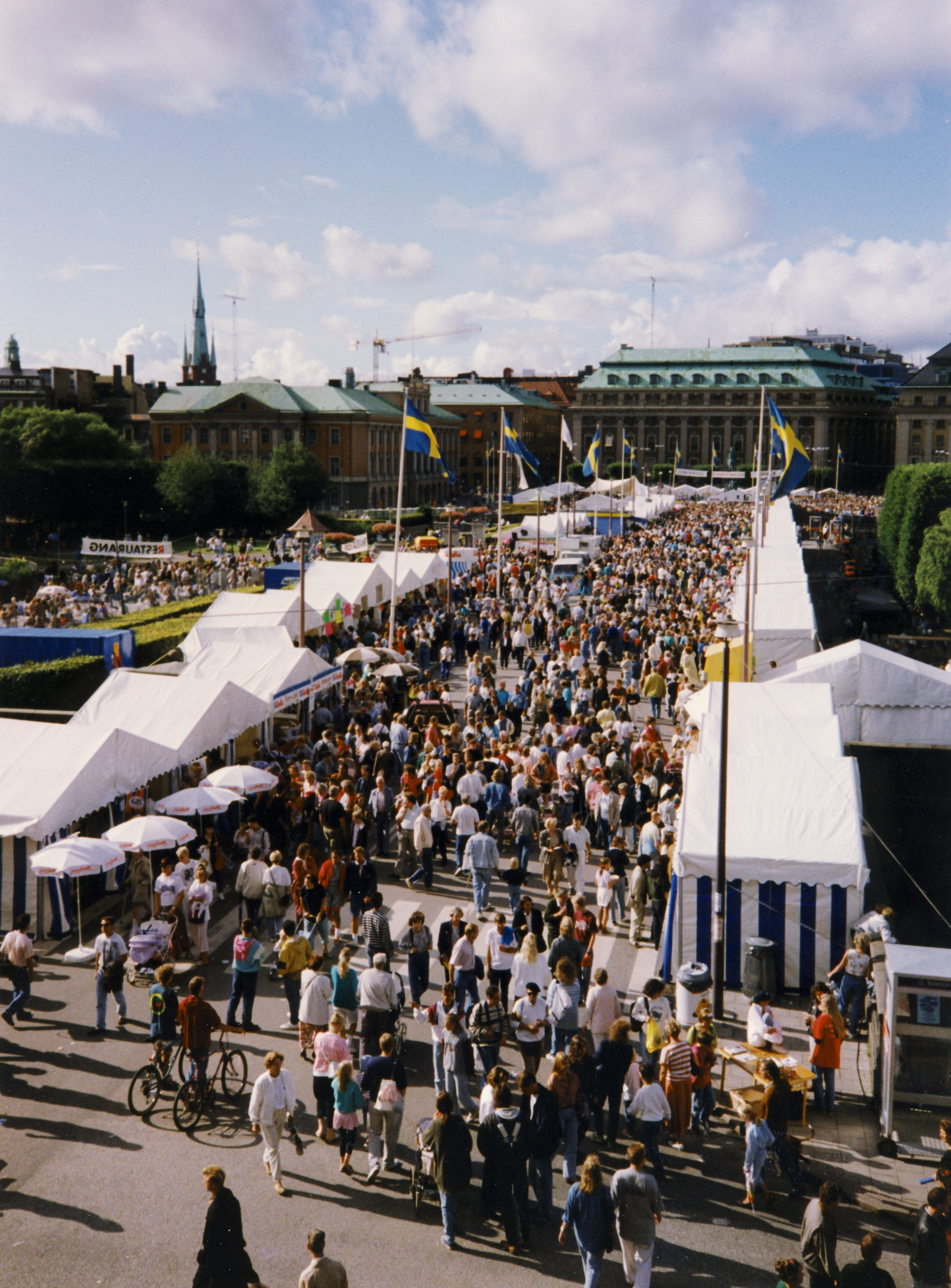 Stockholm Water Festival på Norrbro 1991